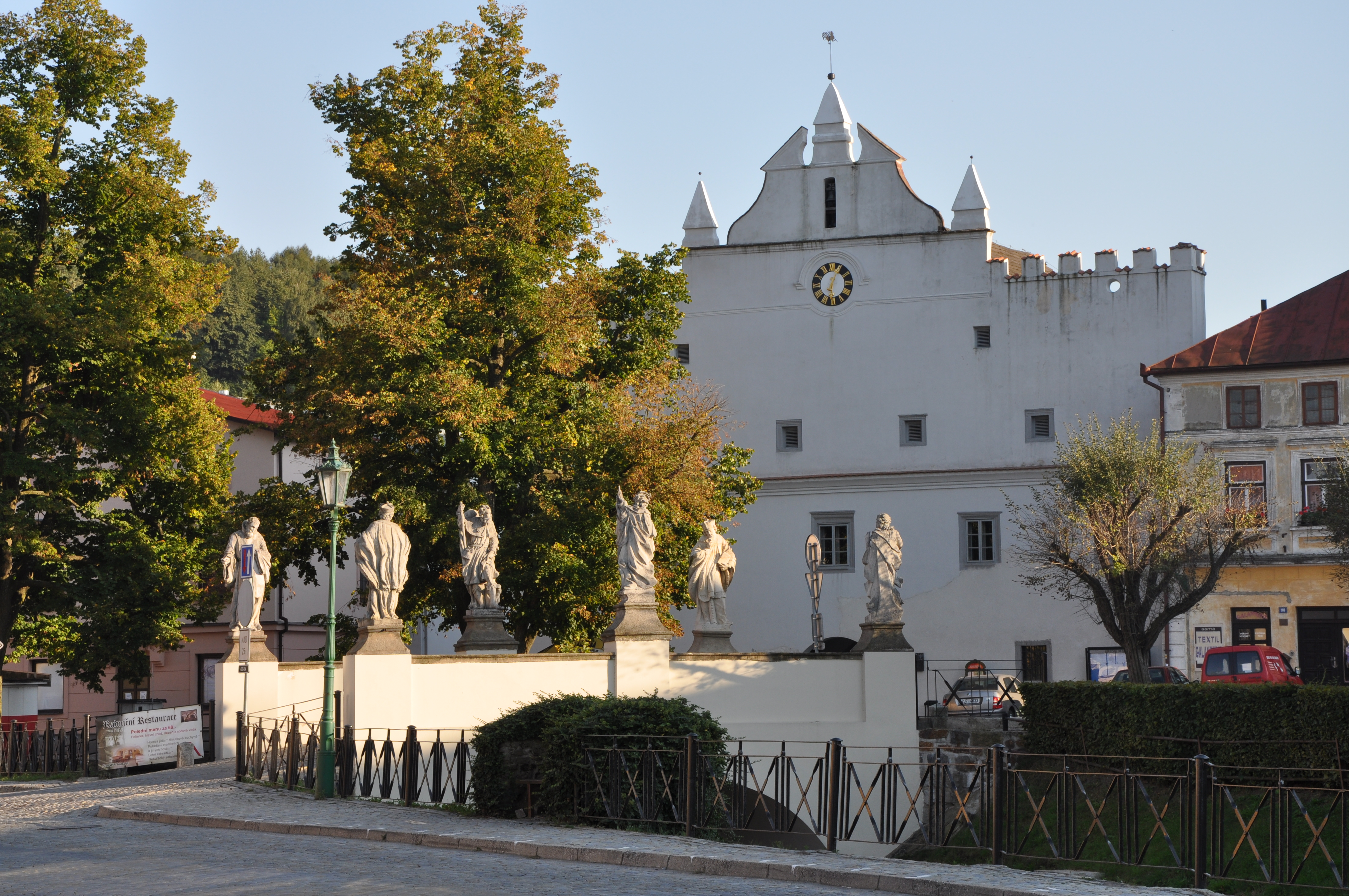 Brtnice, most a radnice.